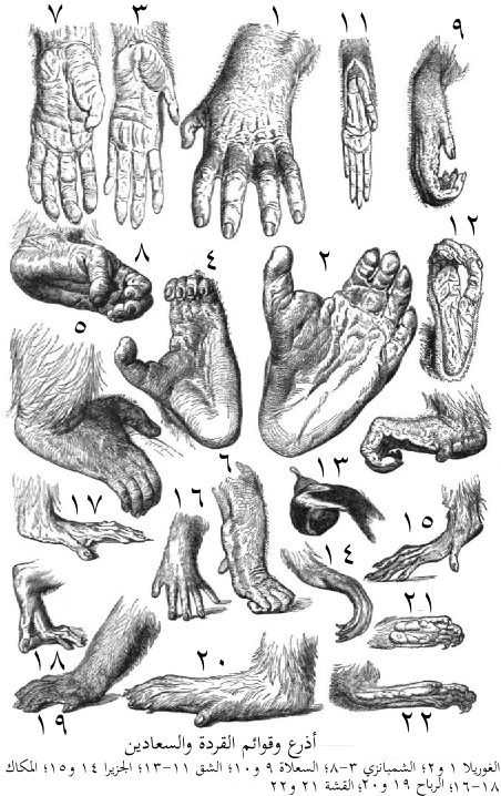 قوائم عدَّة أنواع من الرئيسيَّات